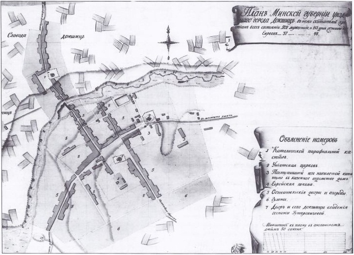 Докшыцы. План канца XVIII ст. (РДВГА)